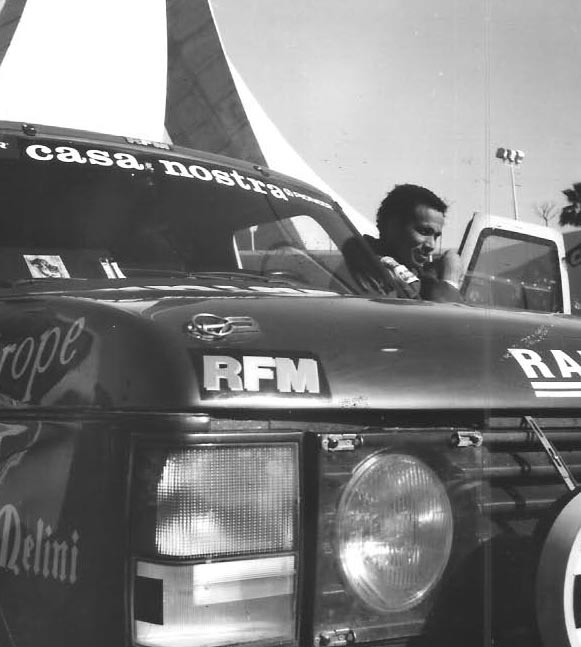 Mano Dayak le Targui du désert